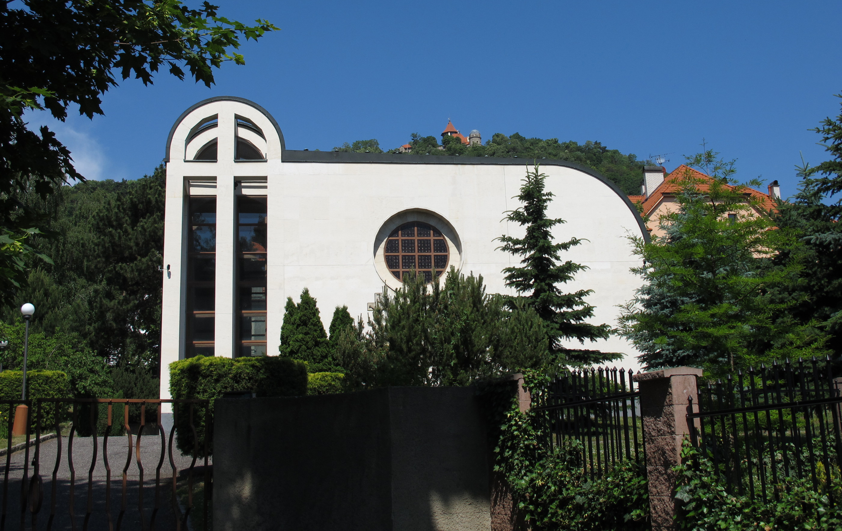 Kostel sv. Václava v Mostě